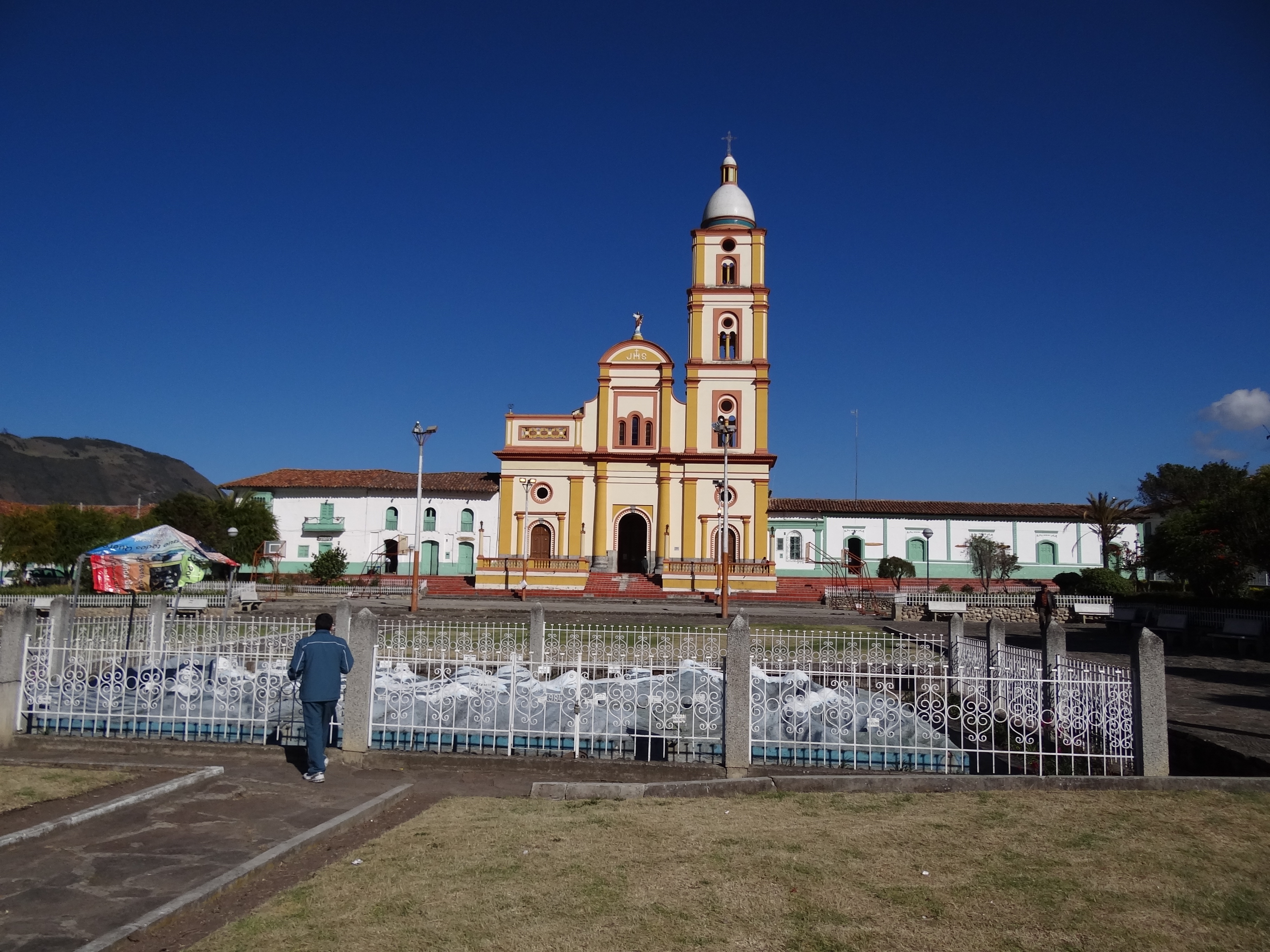 Parque principal del municipio de El Cocuy, departamento de Boyacá, Colombia